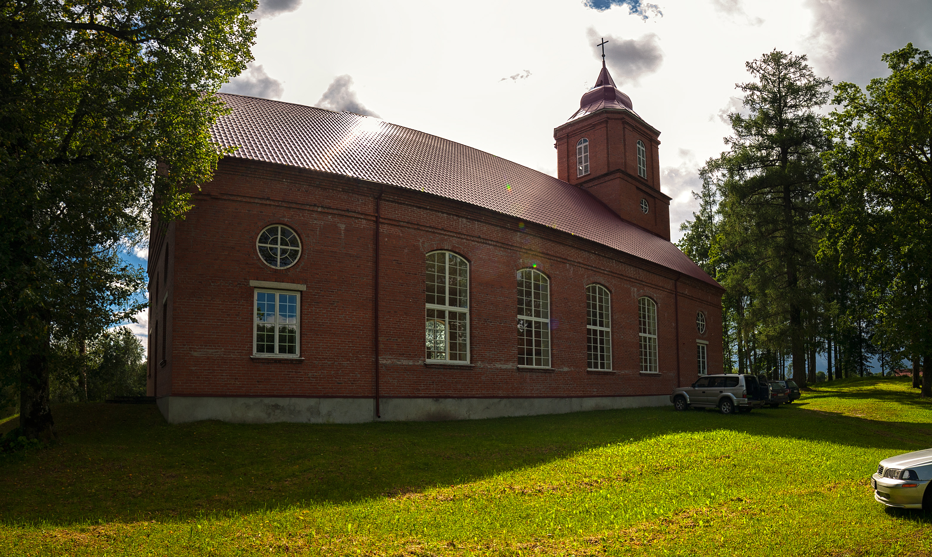 Liezēres luterāņu baznīca